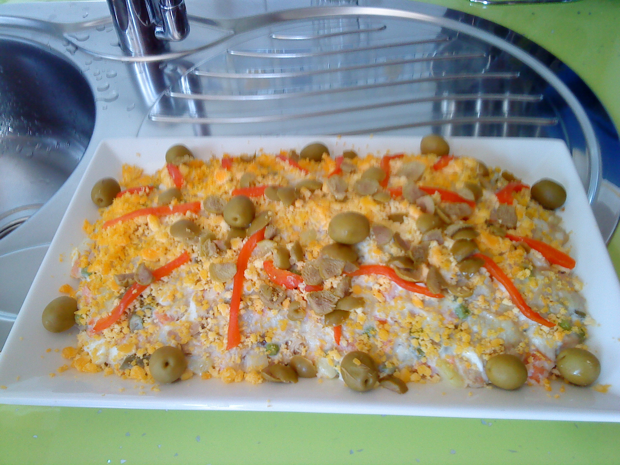 Ensaladilla rusa estilo bar ,procedente de congelado previo,con ingredientes de pequeño tamaño ,con mayonesa casera no industrial.